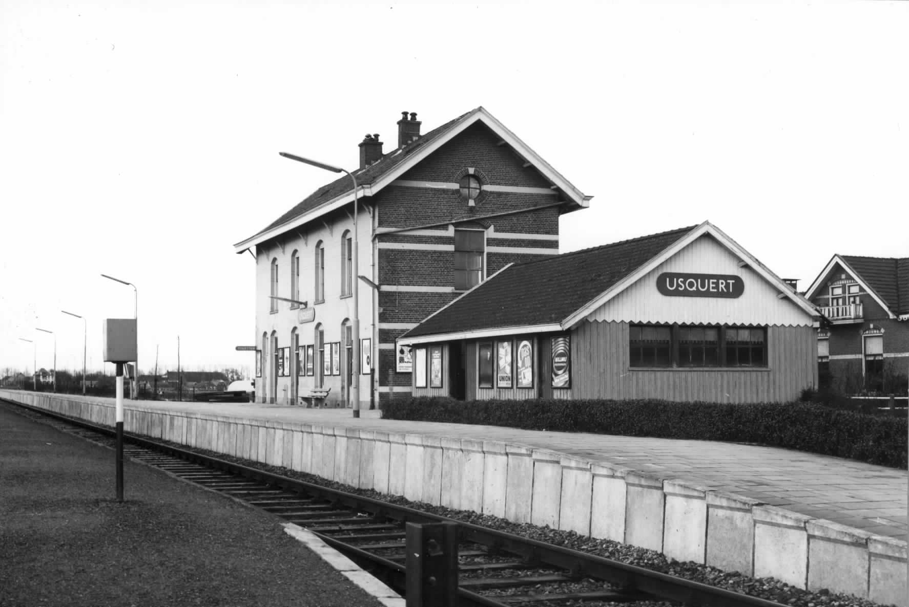 Gezicht op de perronzijde van het N.S.-station Usquert te Usquert.